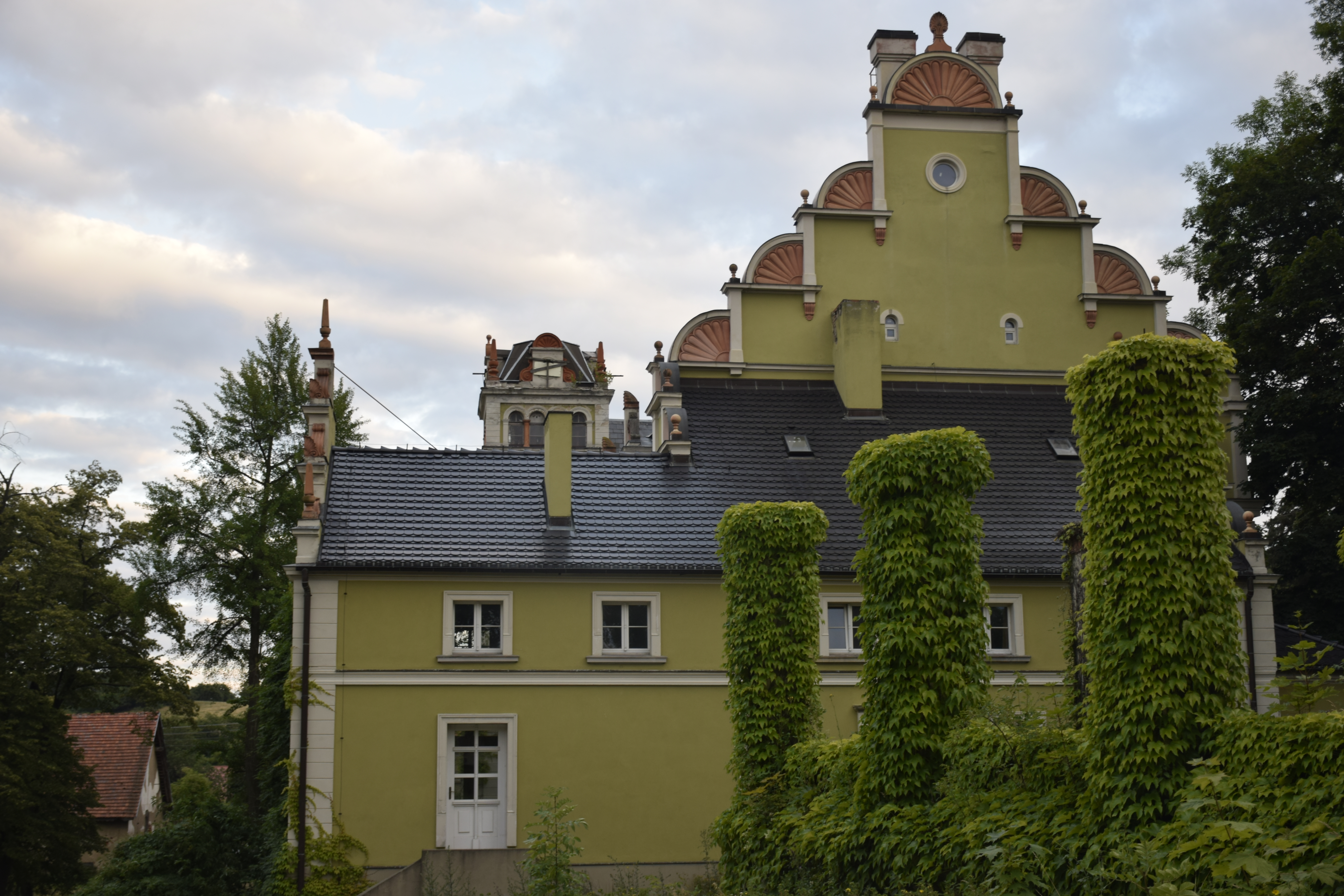 Kłonice. Polska.